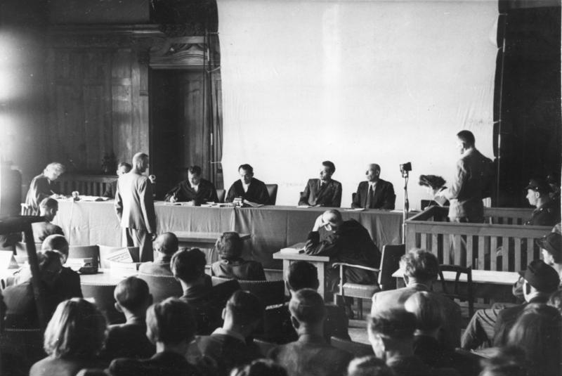 Waldheimer Prozesse ADN-ZB/Heilig DDR: Kriegsverbrecherprozeß in Waldheim. Im Rahmen der von der DDR eingeleiteten Prozesse gegen die aus den Internierungslagern übernommenen Kriegs- und Naziverbrecher begannen am 20.6.1950 im Rathaussaal von Waldheim (Sachsen) die ersten Verhandlungen. - Blick in den Gerichtssaal. Rechts: der Angeklagte, der ehemalige Kriminalsekretär Alfred Schulz, der beschuldigt wurde, in der Zeit vom 9.3.45 bis zum 11.4.45 auf dem Gelände des Städtischen Krematoriums in Meißen fortgesetzt Verbrechen gegen die Menschlichkeit begangen zu haben. Er erschoß durch Genickschuß an verschiedenen Tagen insgesamt 17 sowjetische, polnische und italienische Zwangsarbeiter. Er wurde zu lebenslänglichem Zuchthaus verurteilt. 21.6.1950